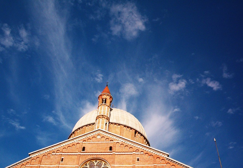 Basilica di Sant'Antonio, Padova, Italy